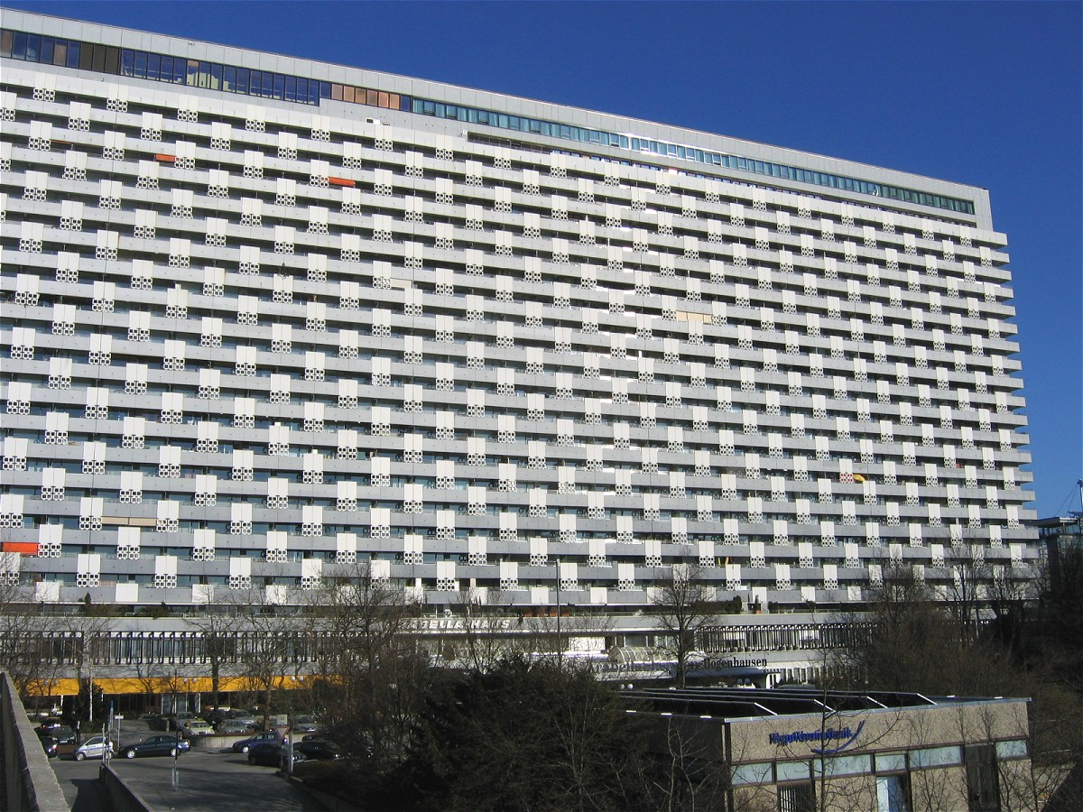 Arabella-Haus, München